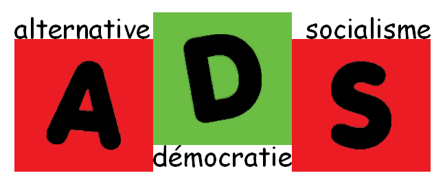 Reproduction du logo de Alternative démocratie socialisme